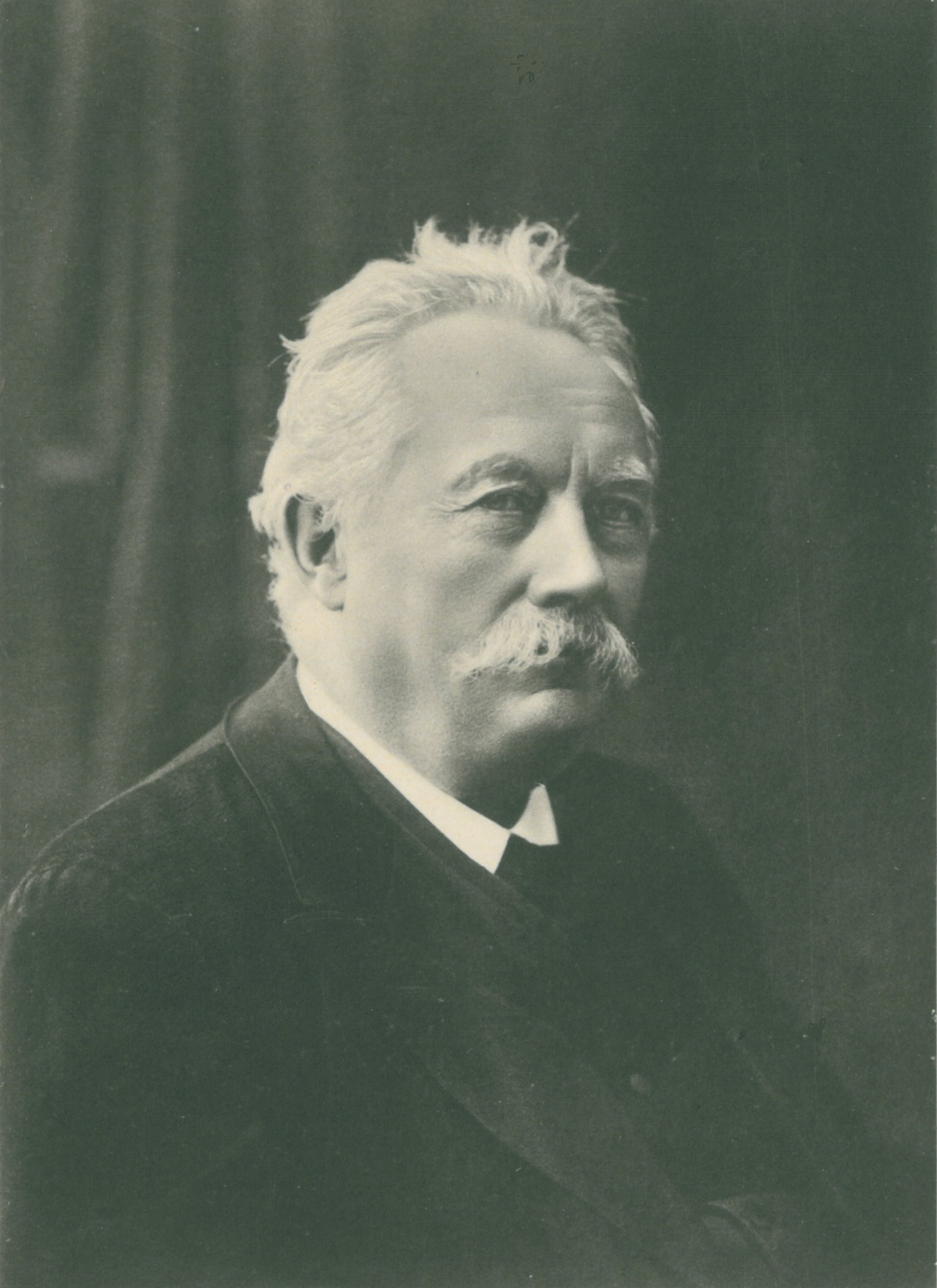 Icelandic politician Björn M. Olsen.